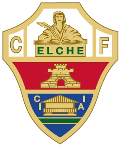 Escudo Elche CF